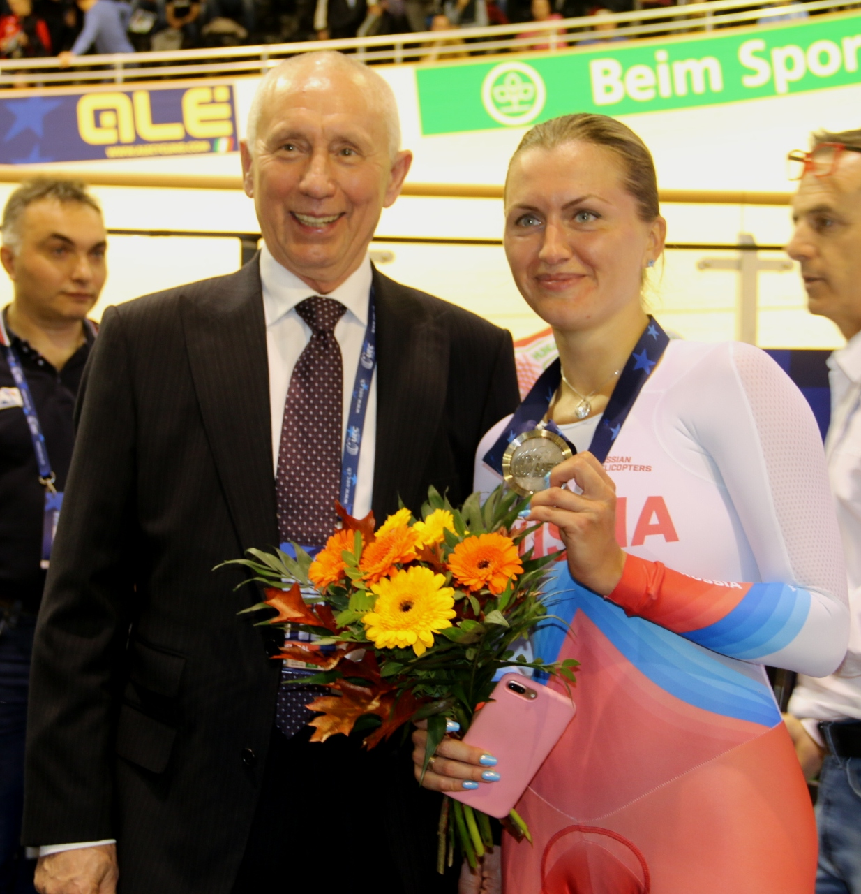 Evgenia Augustinas, russische Radsportlerin, mit Alexander Gusyatnikov, Vizepräsident der UCE